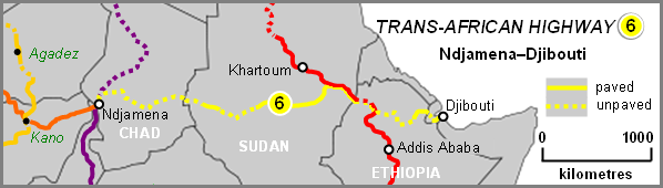 Map of Ndjamena–Djibouti Highway